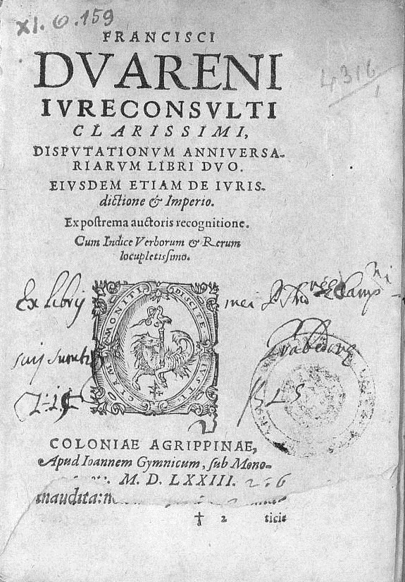 Frontespizio